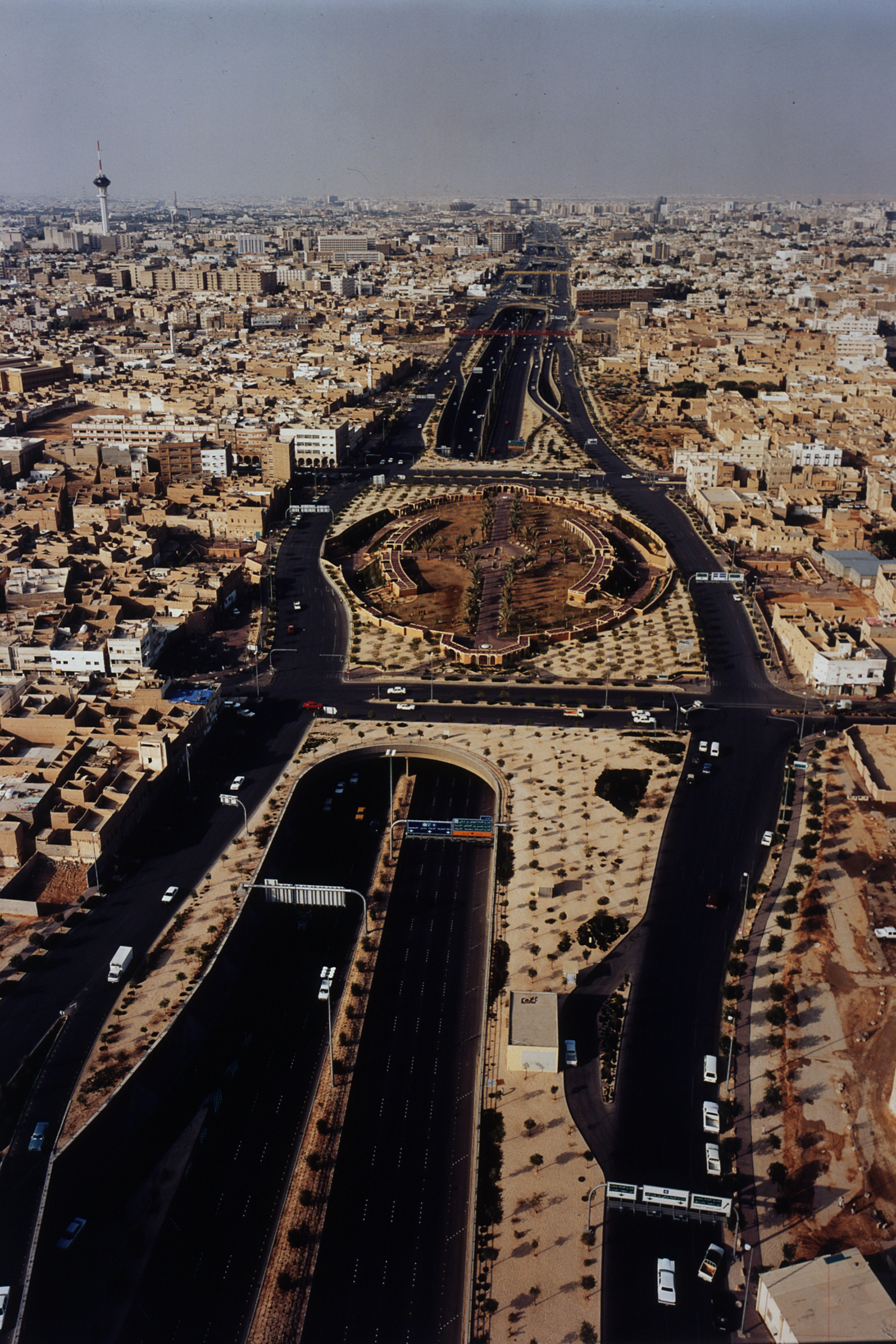 Stadtautobahn in Riyadh, Saudi Arabien